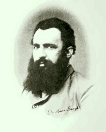 Hans Stingl (1832 - 1893), Rakouský právník a politik.